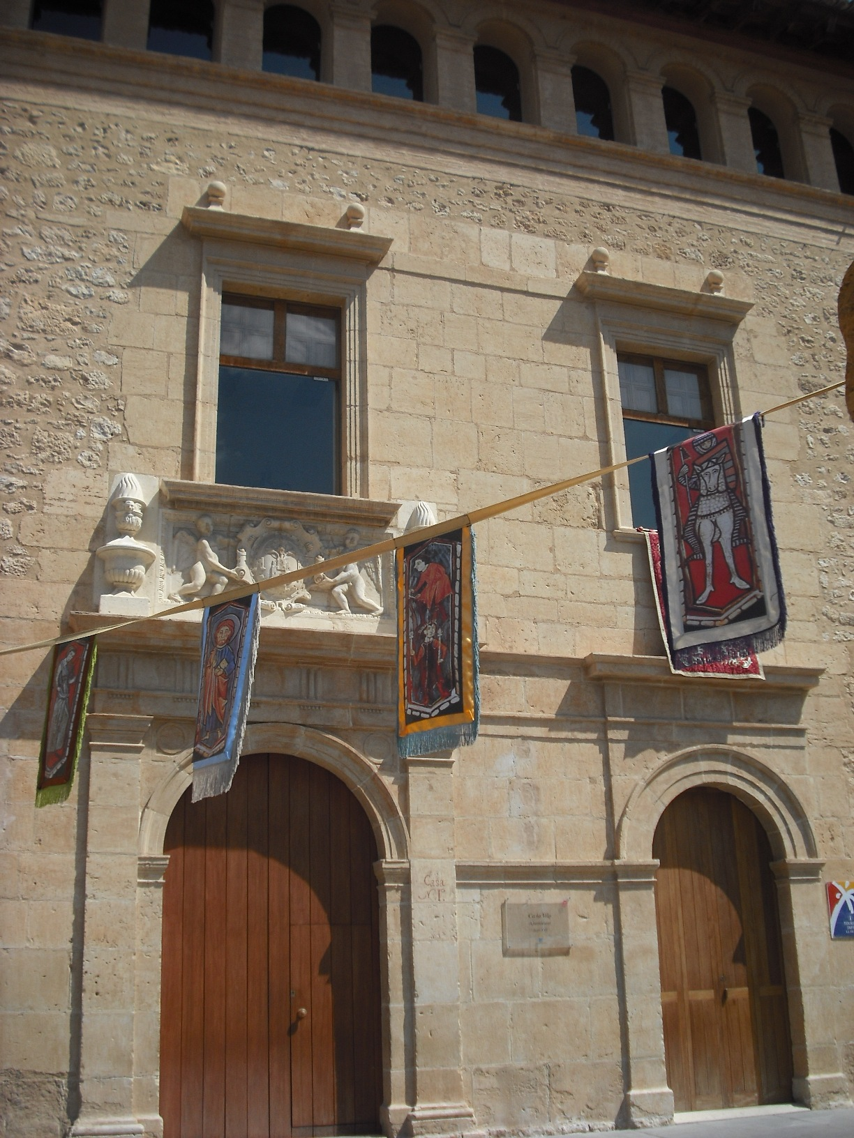 Ca la Vila, antiga seu del Consell i ajuntament.